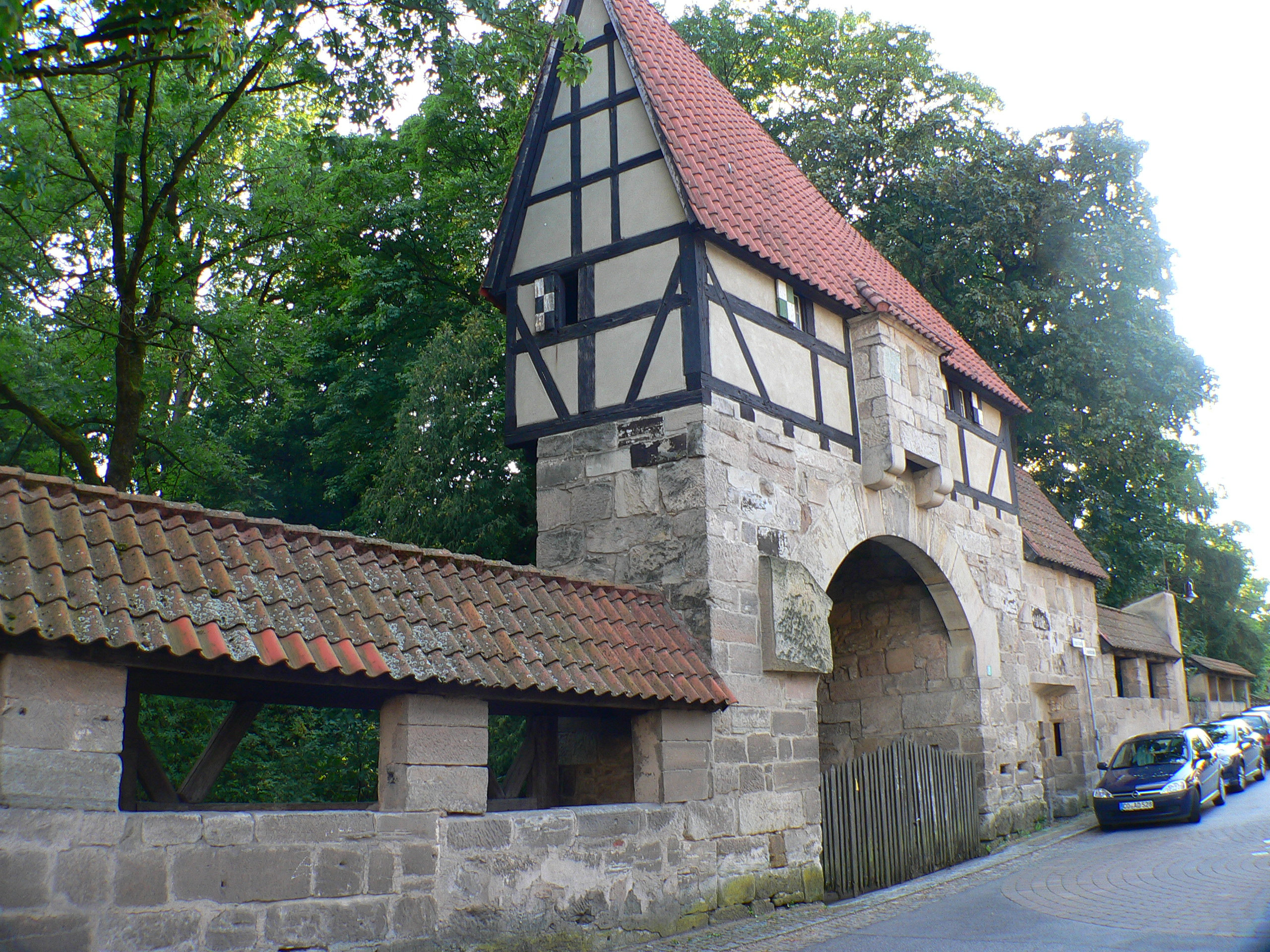 Wasserschloss in Untersiemau, Kreis Coburg, Bayern